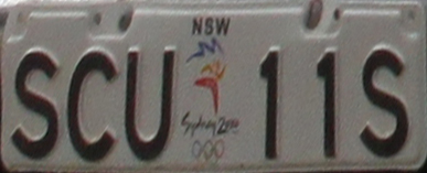 Holden FC Wagon